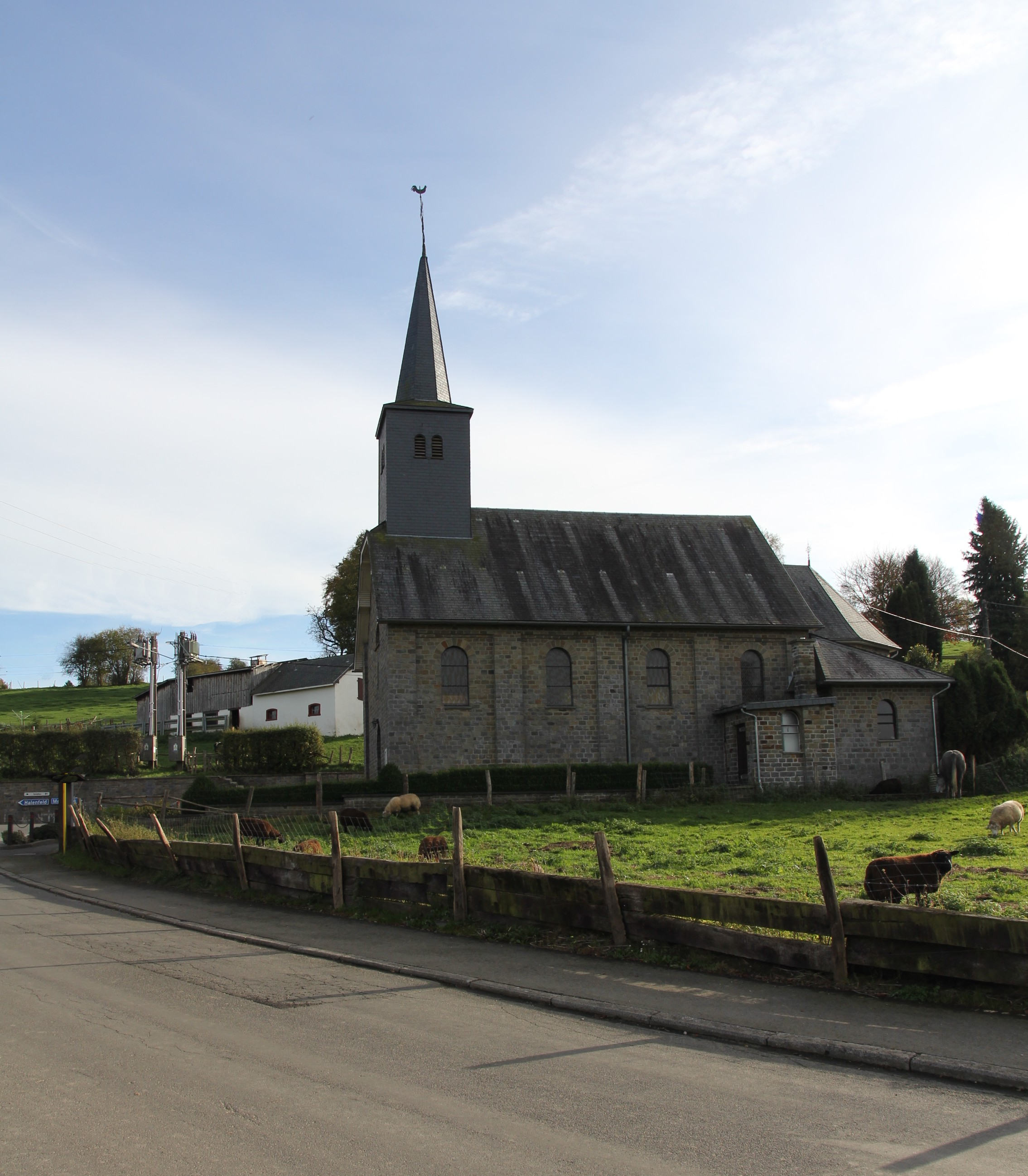 Lambertuskapelle von 1956 in Valender, Amel, Belgien